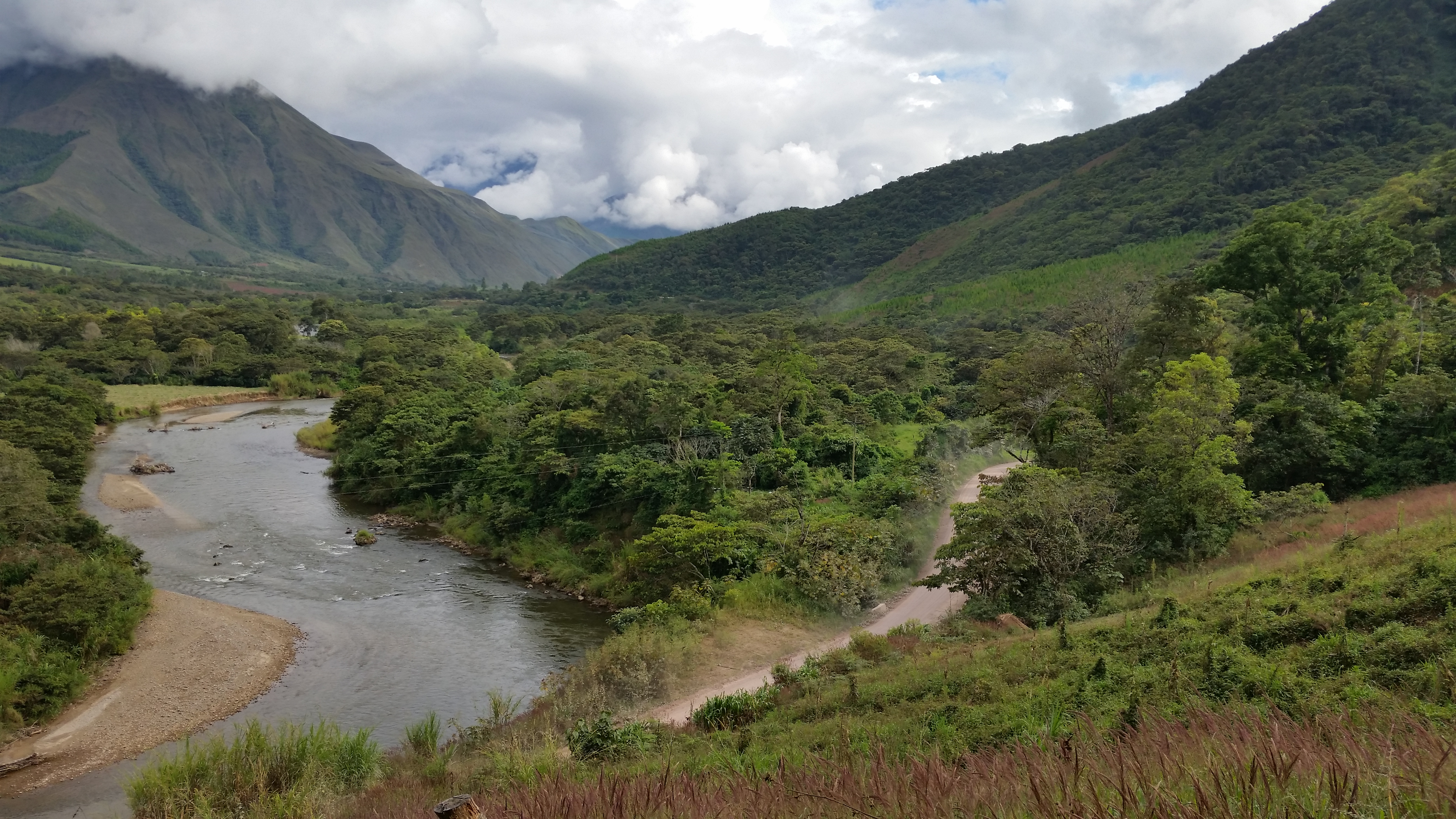 Rio Huancabamba